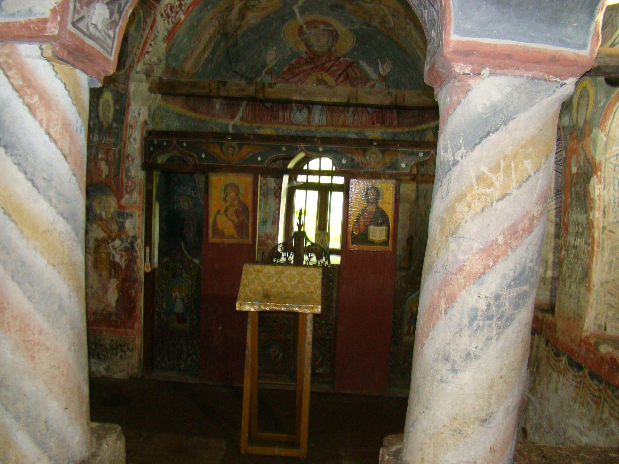 Biserica „Sf. Îngeri” - sat Bistrița; comuna Costești